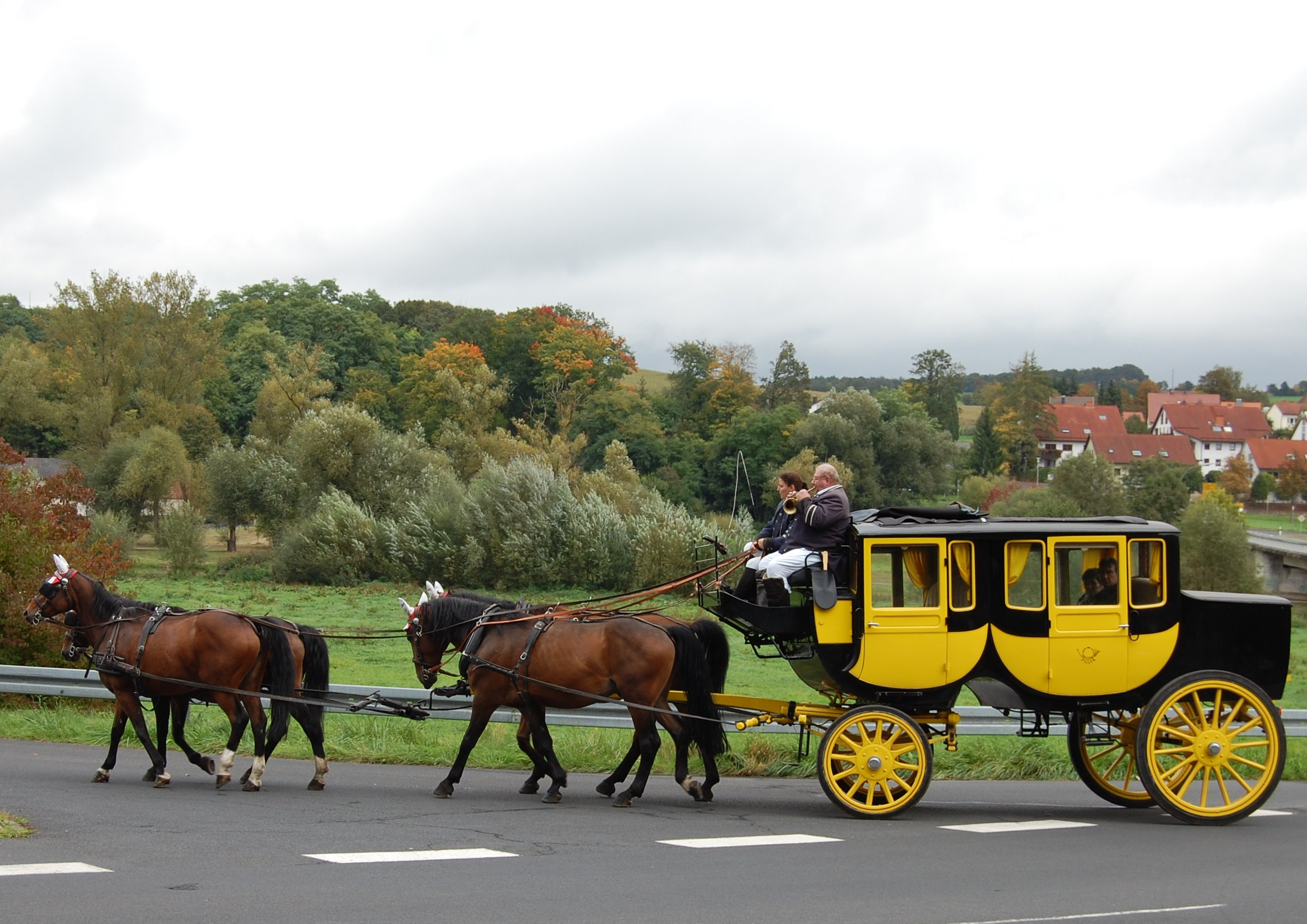 Postkutsche auf Liniendienst zwischen Bad Kissingen und Bad Bocklet; einziger und letzter Postkutschendienst der Deutschen Post AG